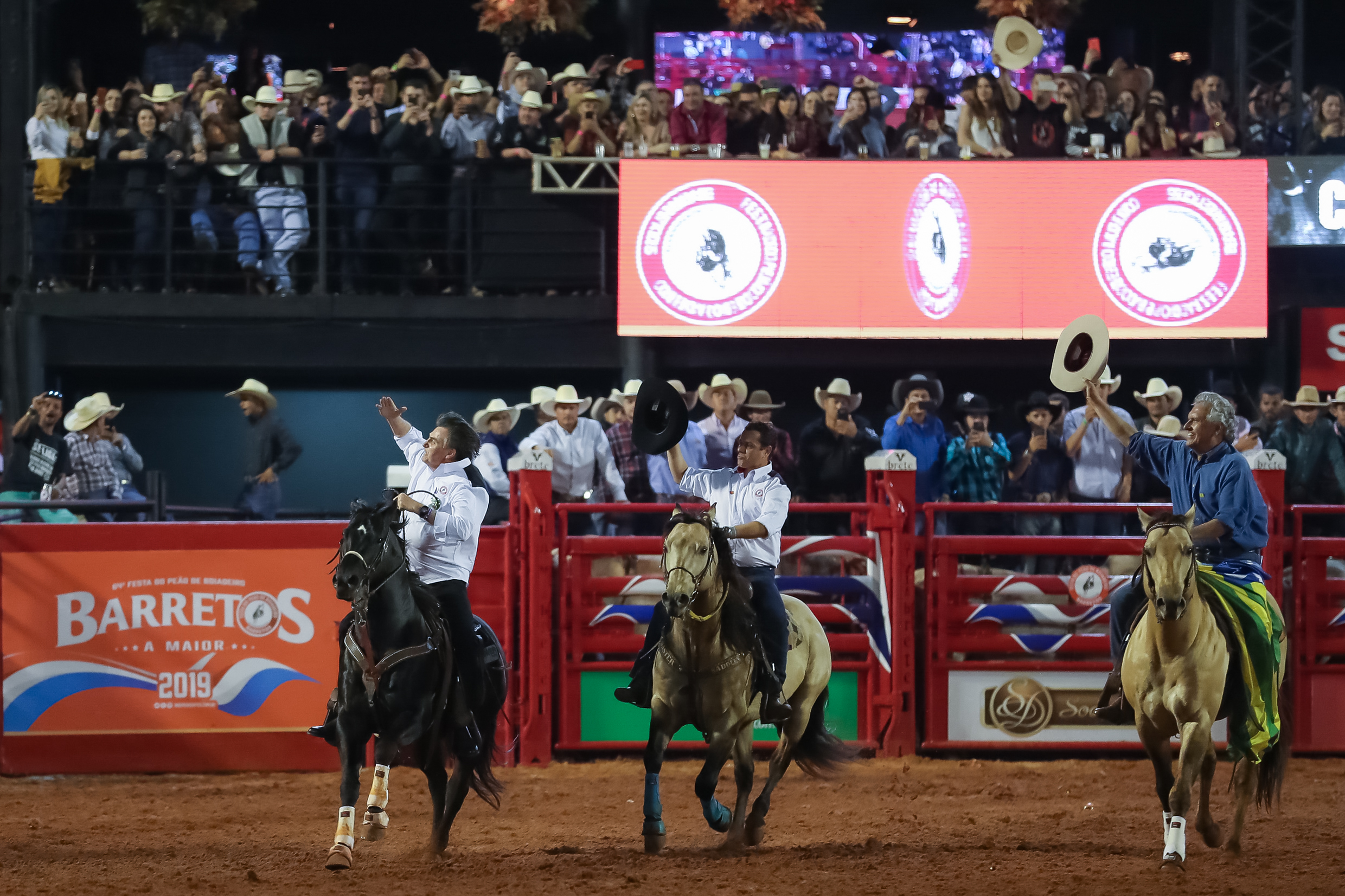 (Barretos - SP, 17/08/2019) Presidente da República, Jair Bolsonaro, durante Cerimônia de abertura do rodeio da 64ª Festa do Peão de Boiadeiro de Barretos. Foto: Marcos Corrêa/PR